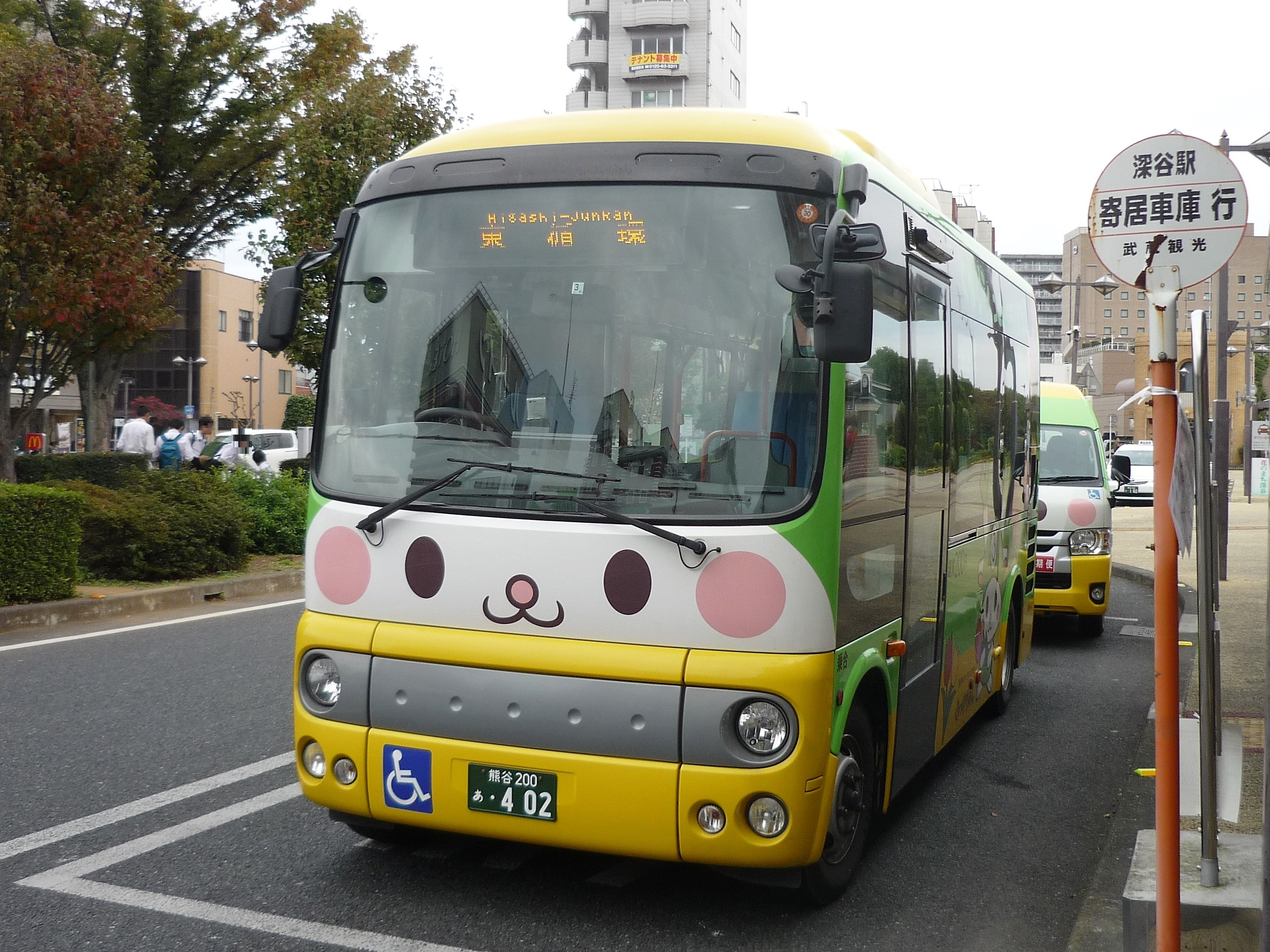 深谷市コミュニティバス「くるリン」東循環便（深谷駅北口） Panasonic Lumix DMC-FS3